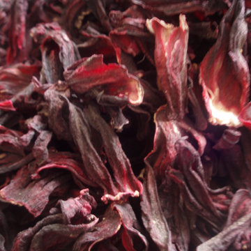 esta foto es un fraude de direccion hibiscus